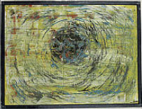 Zentrifugalkraft am Jüngsten Tag